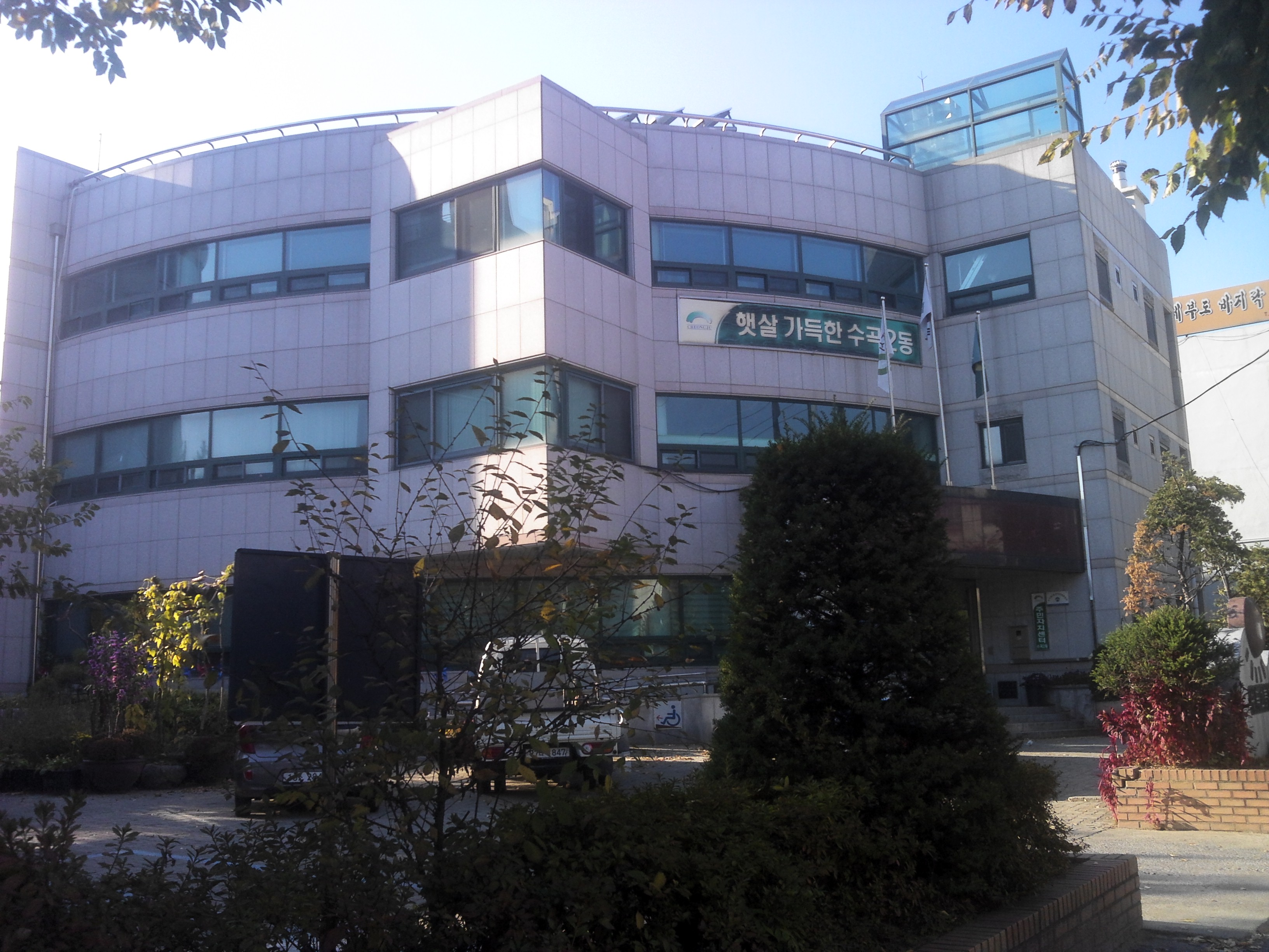 청주시 수곡2동 주민센터